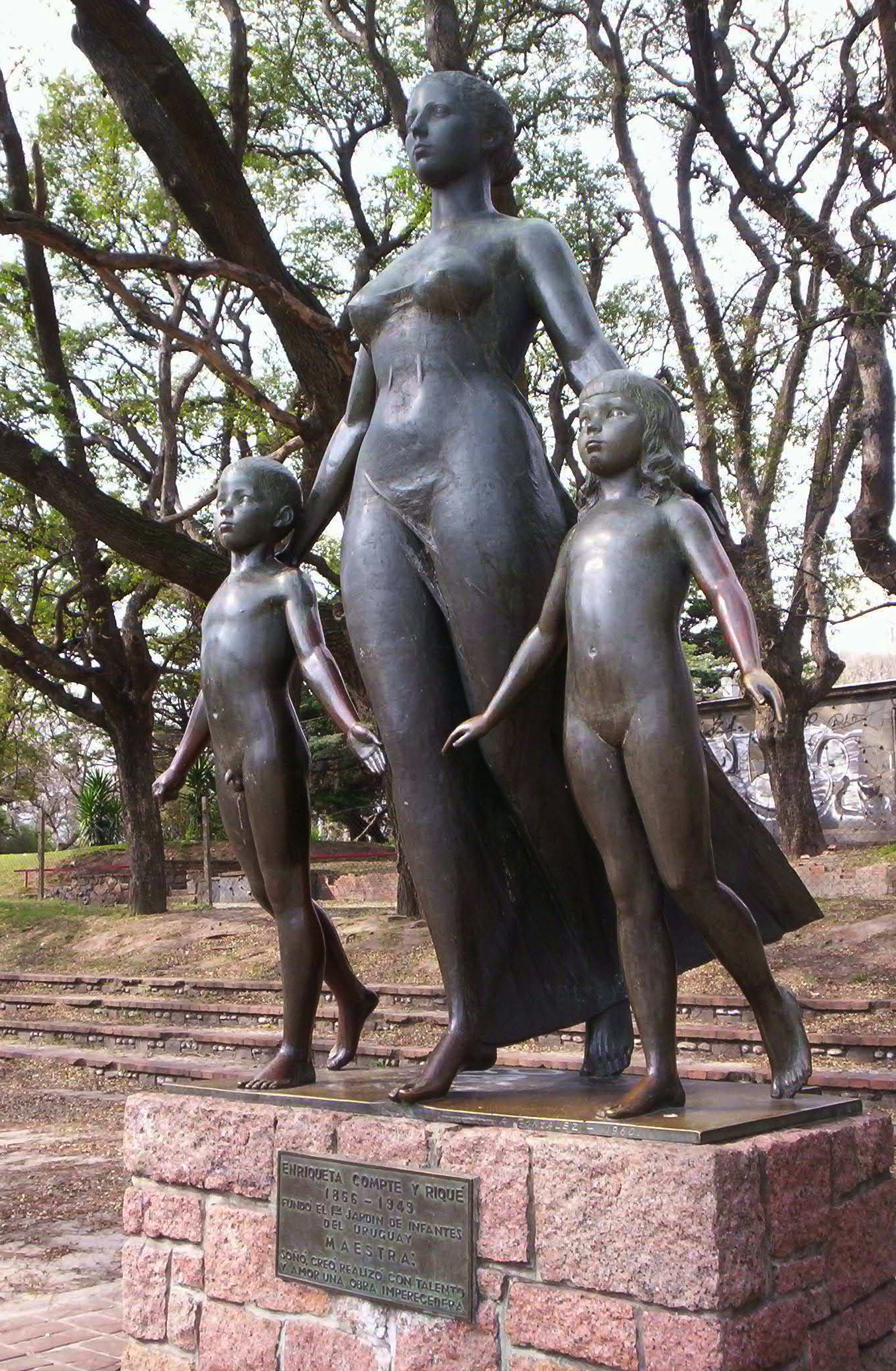 Enriqueta Compte y Riqué. Ubicada en el departamento de Montevideo